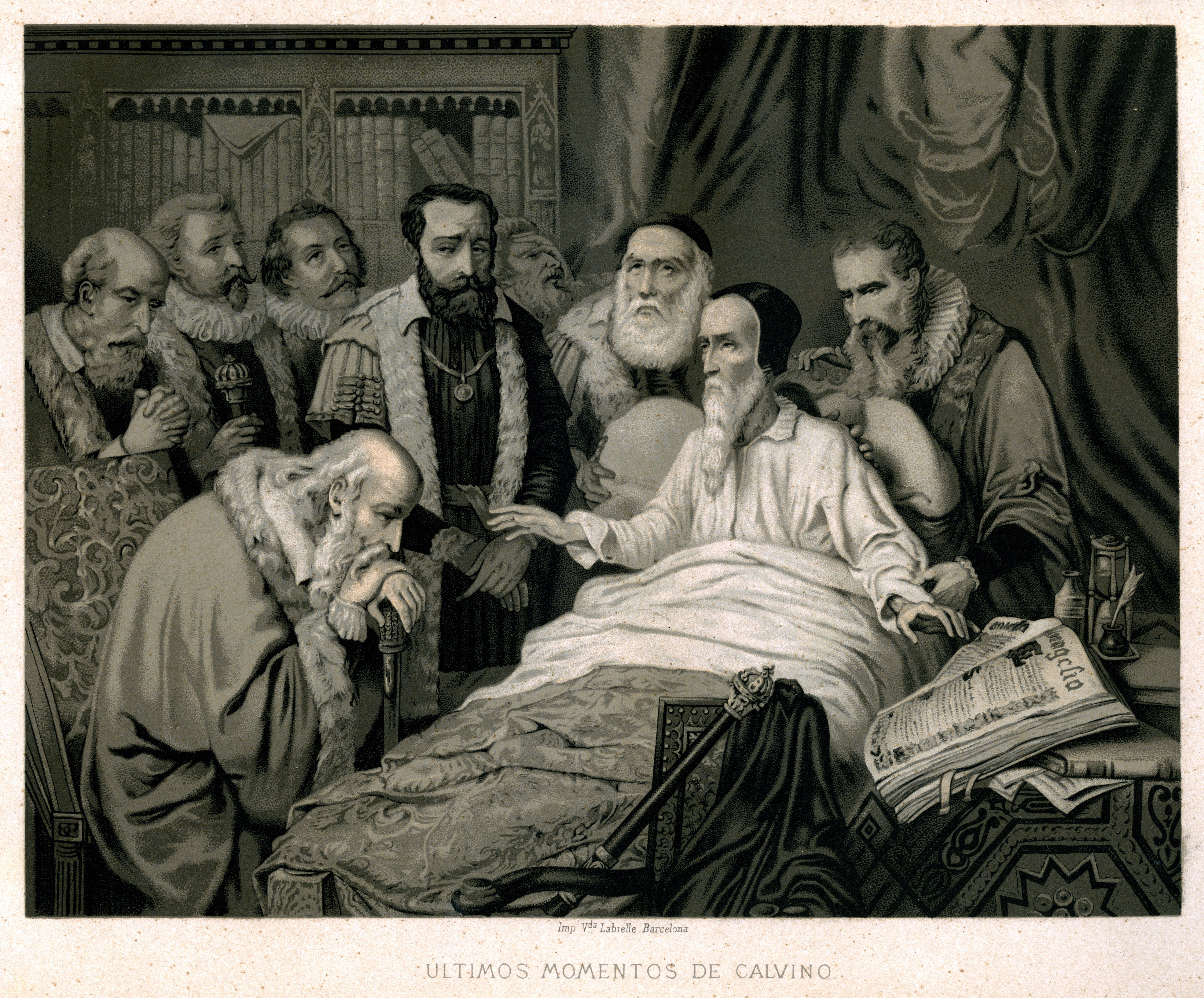 "Imp. Vda. Labielle. Barcelona". Ilustraciones de la obra : La revolución religiosa : obra filosófico-historica dividida en cuatro partes : Savonarola, Lutero, Calvino, San Ignacio de Loyola / por Emilio Castelar. - Barcelona : Montaner y Simón, 1880-1883